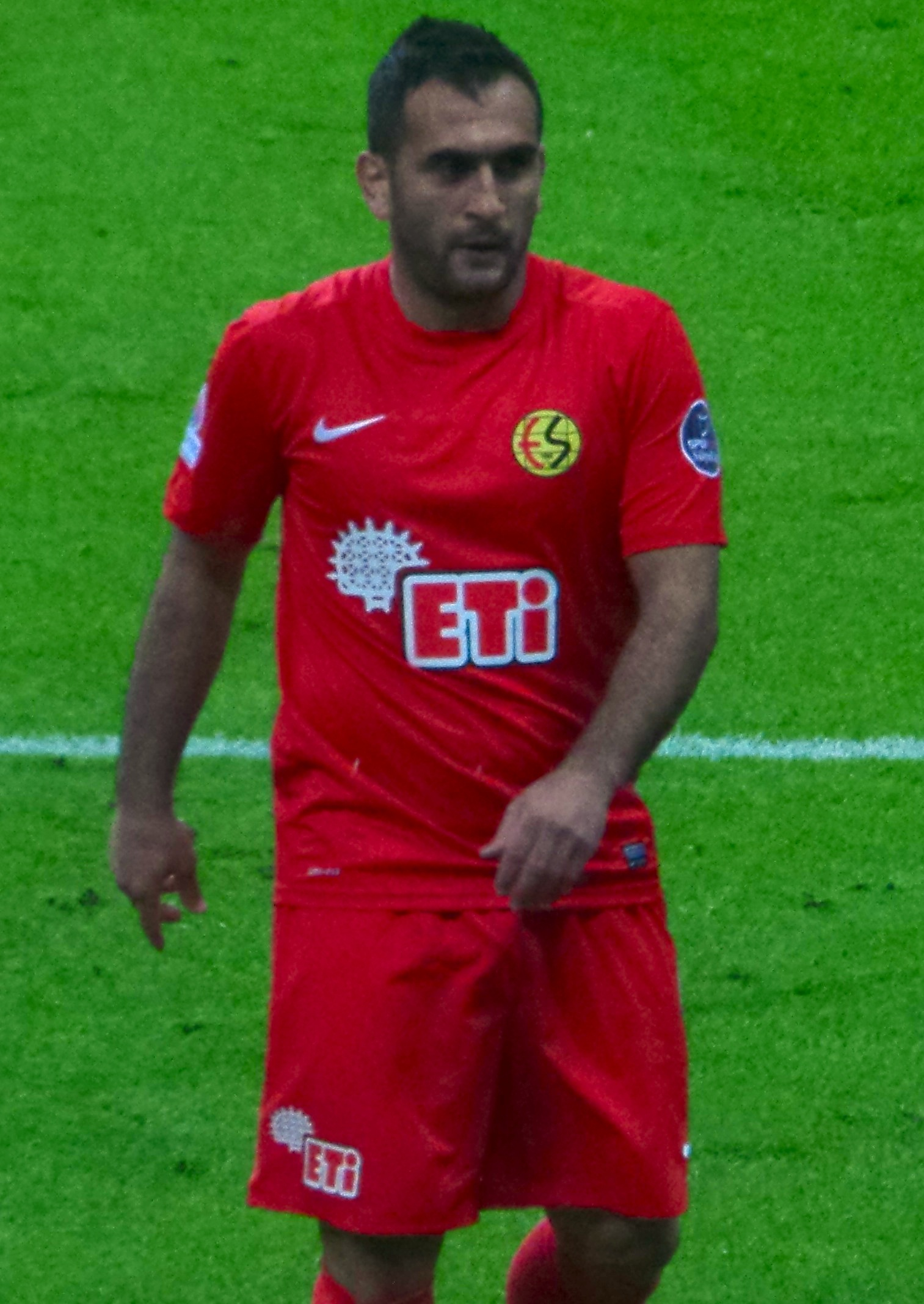 Erman Kılıç